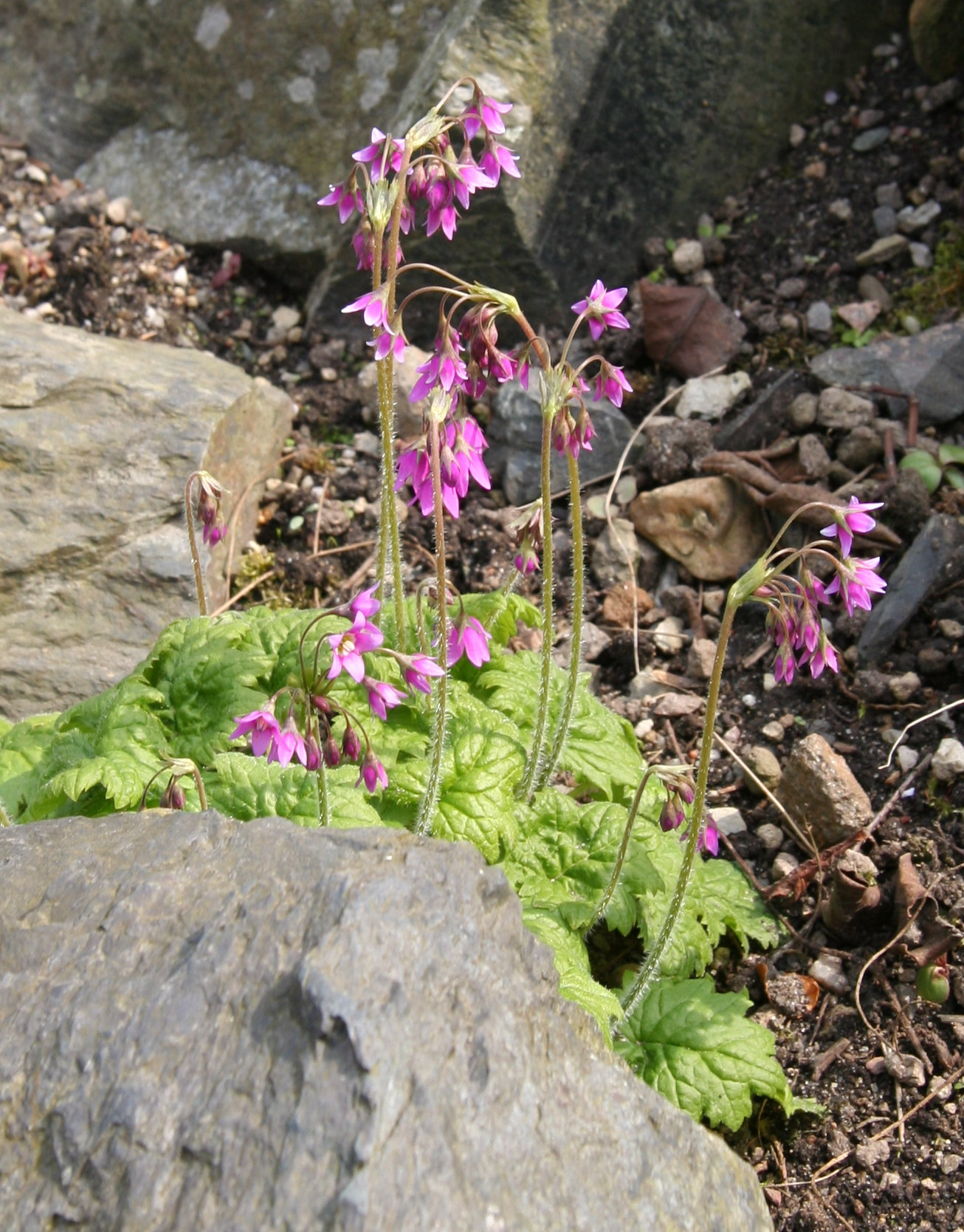 Cortusa matthioli subsp. pekinensis im Botanischen Garten Dresden